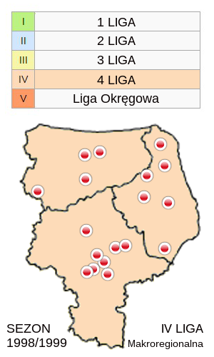 Jagiellonia Białystok w sezonie 1998/99 -mapka